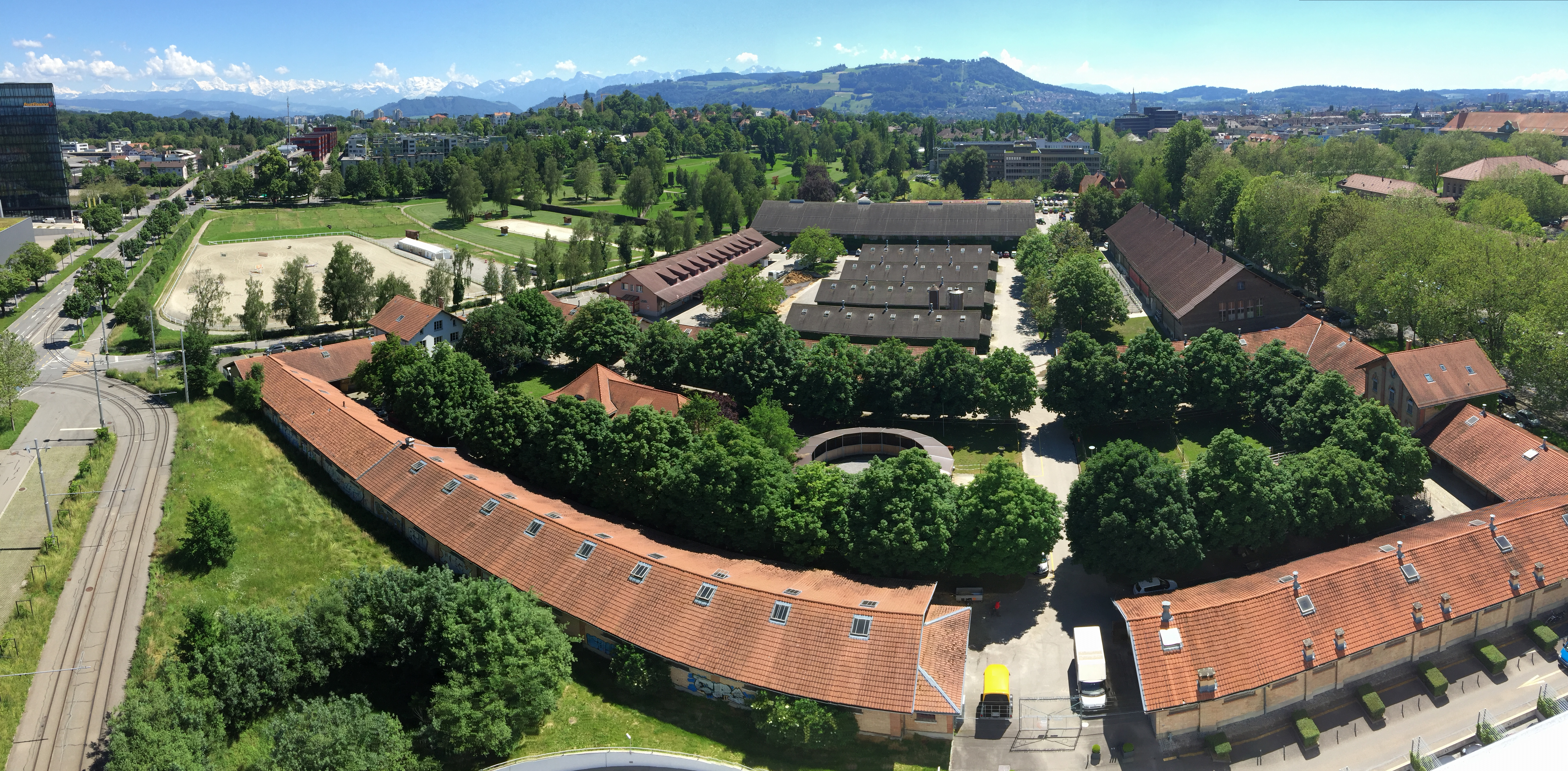 Gelände des Nationalen Pferdezentrums Bern